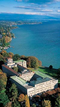 Vue aérienne du Centre William Rappard.